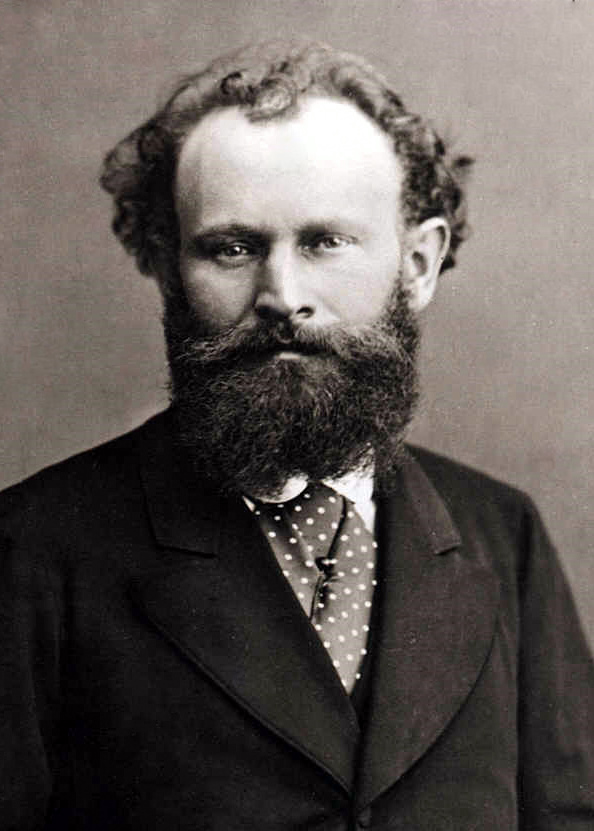 Édouard_Manet, cropped